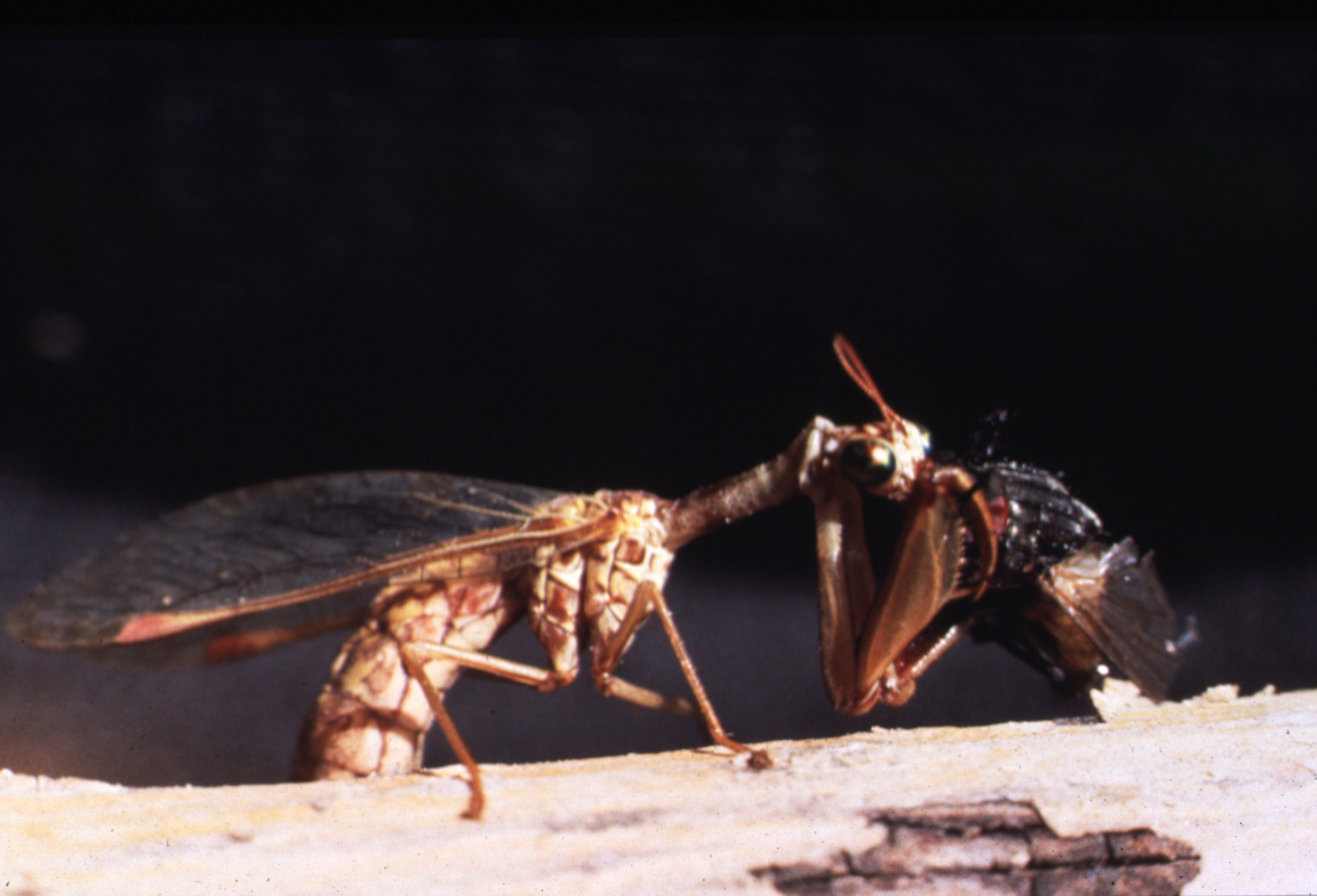 Mantispa mangeant une mouche Photo Salvator, Dabisse, Les Mées, Alpes de Haute Provence, France, 1984 Christian Pinatel 1984